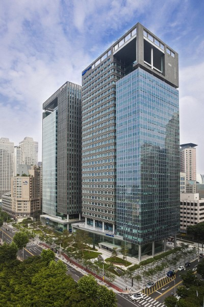 삼성SDS타워